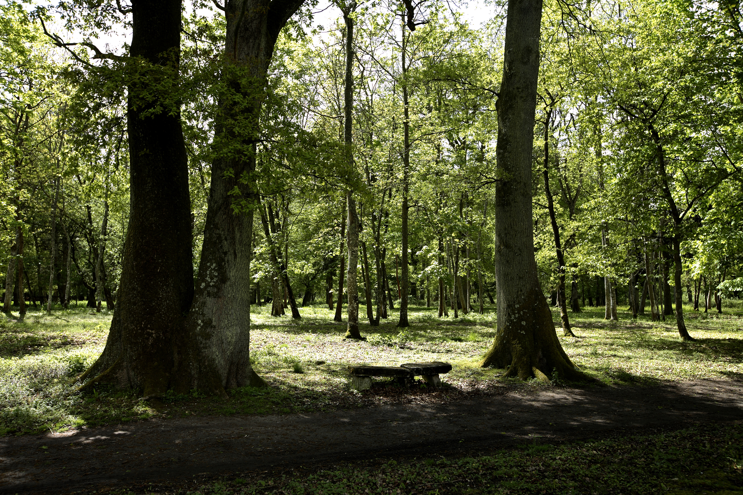 This building is en partie classé, en partie inscrit au titre des Monuments Historiques. .